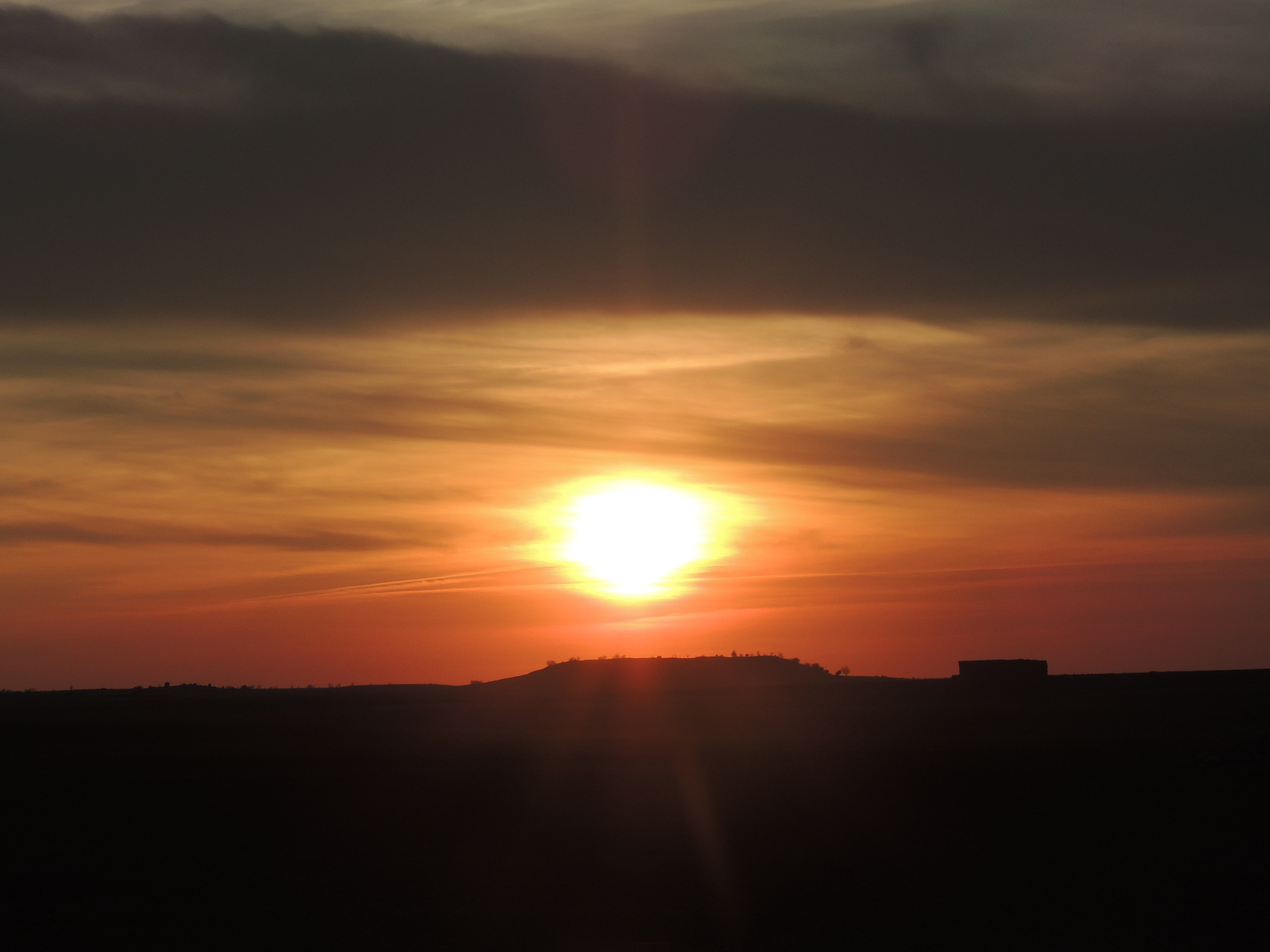 Villafruela y su cerro La Cotarra